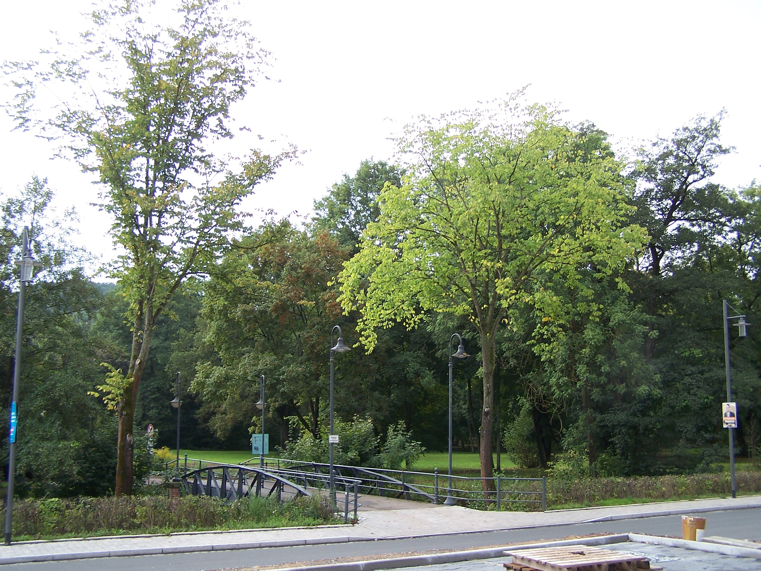 Die Schlossparkbrücke in Hildburghausen an der Clara-Zetkin-Straße.